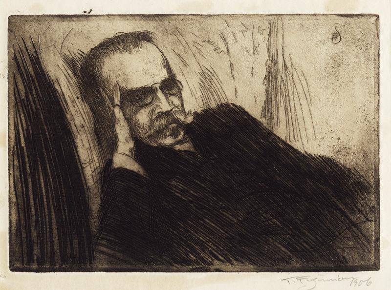 Portrét profesora Jaroslava Golla, lept, 140x199 mm. 1906.